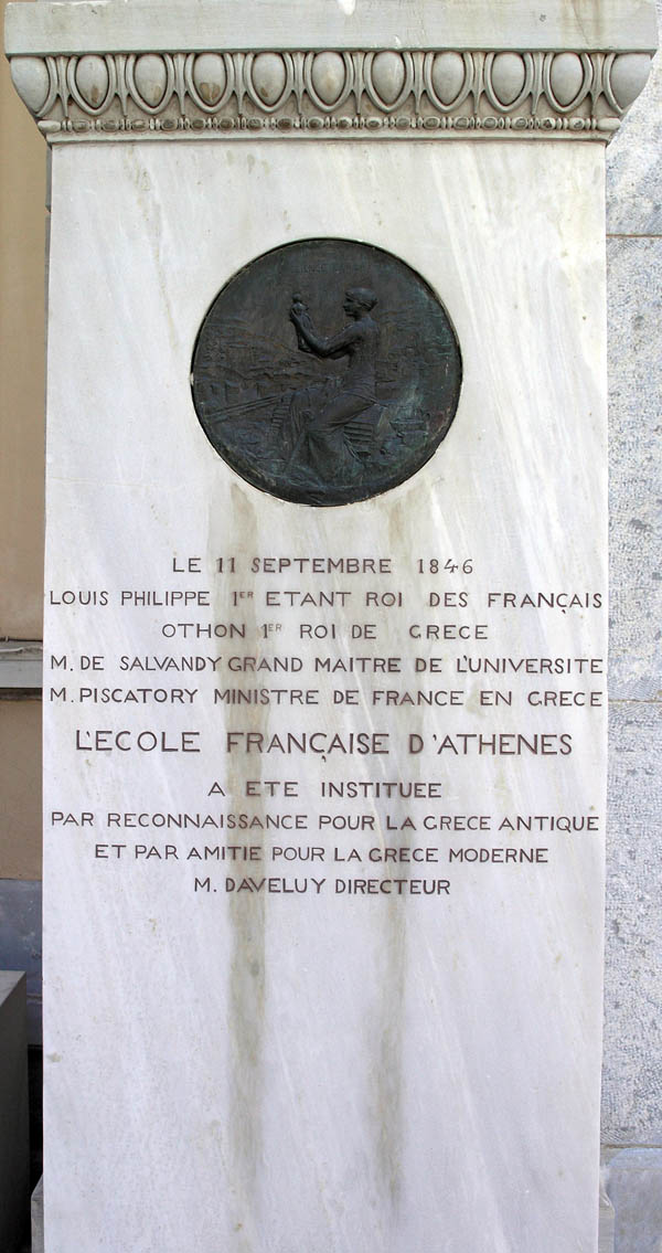 Stèle commémorative de la fondation de l'École française d'Athènes en 1846. Médaille en bronze gravée par Oscar Roty.